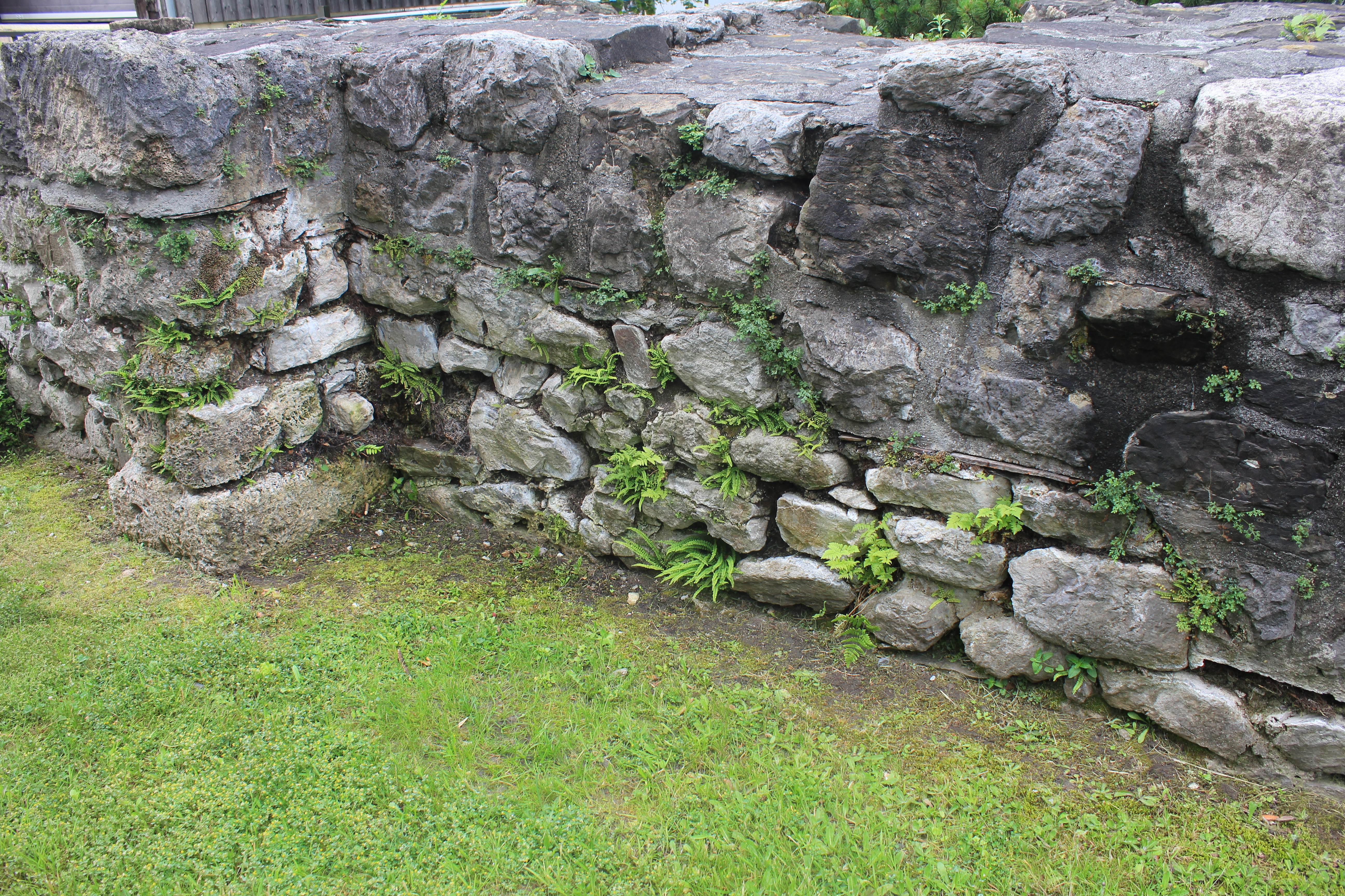 Mauerreste des Kastells Schaan unter neueren Steinen.